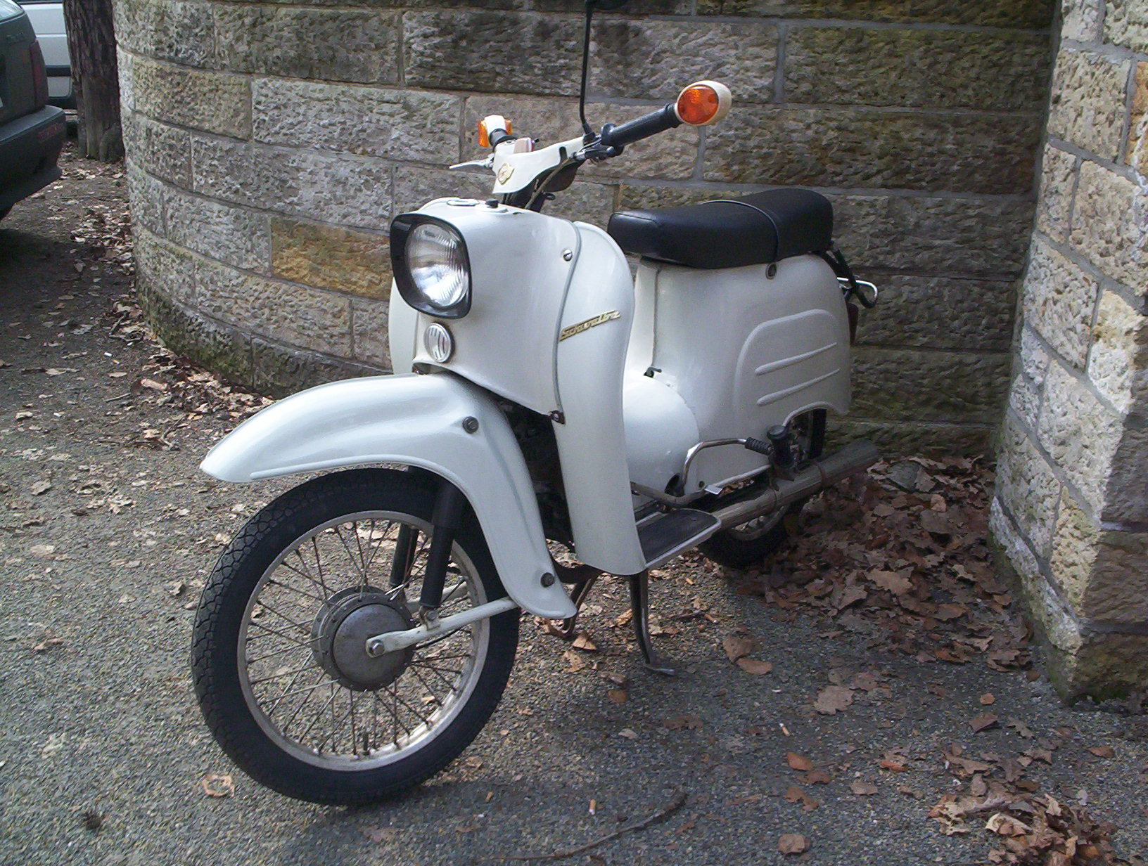 Simson Schwalbe KR51/1 K, Baujahr 1976, Originalzustand